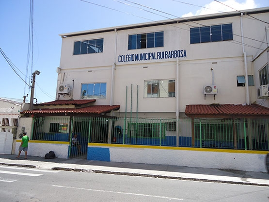 Colégio Municipal Rui Barbosa